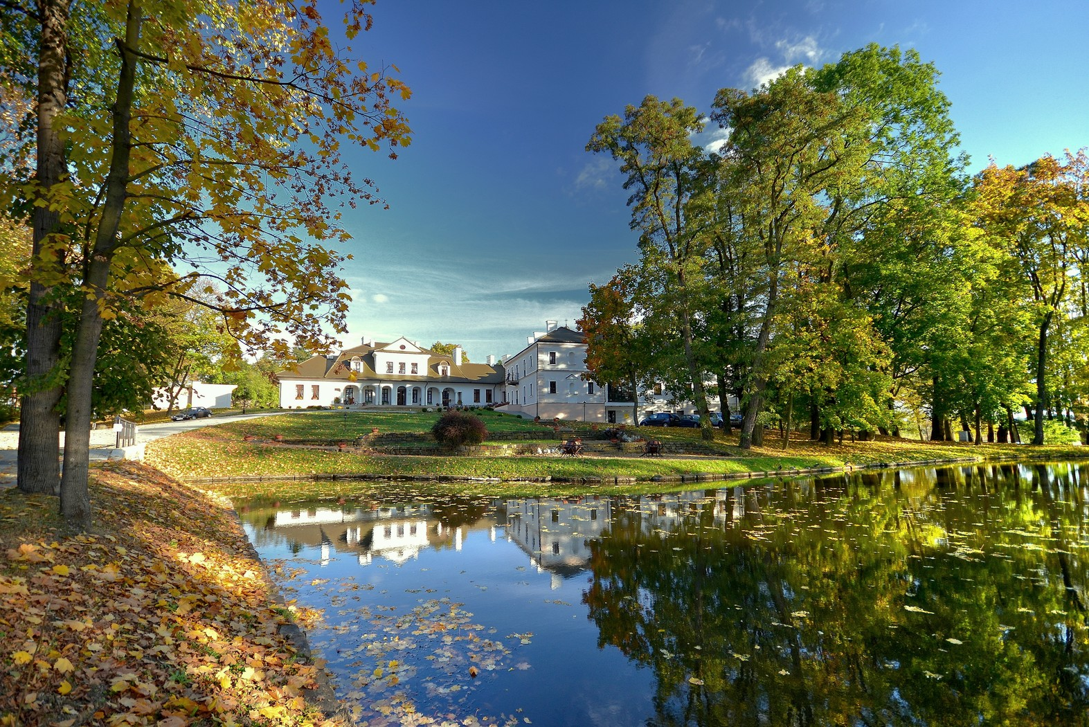 zespół dworski: - dwór, 1 poł. XVII, k. XVIII, XIX/XX - oficyna, XIX/XX - kaplica, 1 poł. XIX - park, XVIII/XIX z pozostałościami umocnień ziemnych , XVII (?) Kombornia, Korczyna